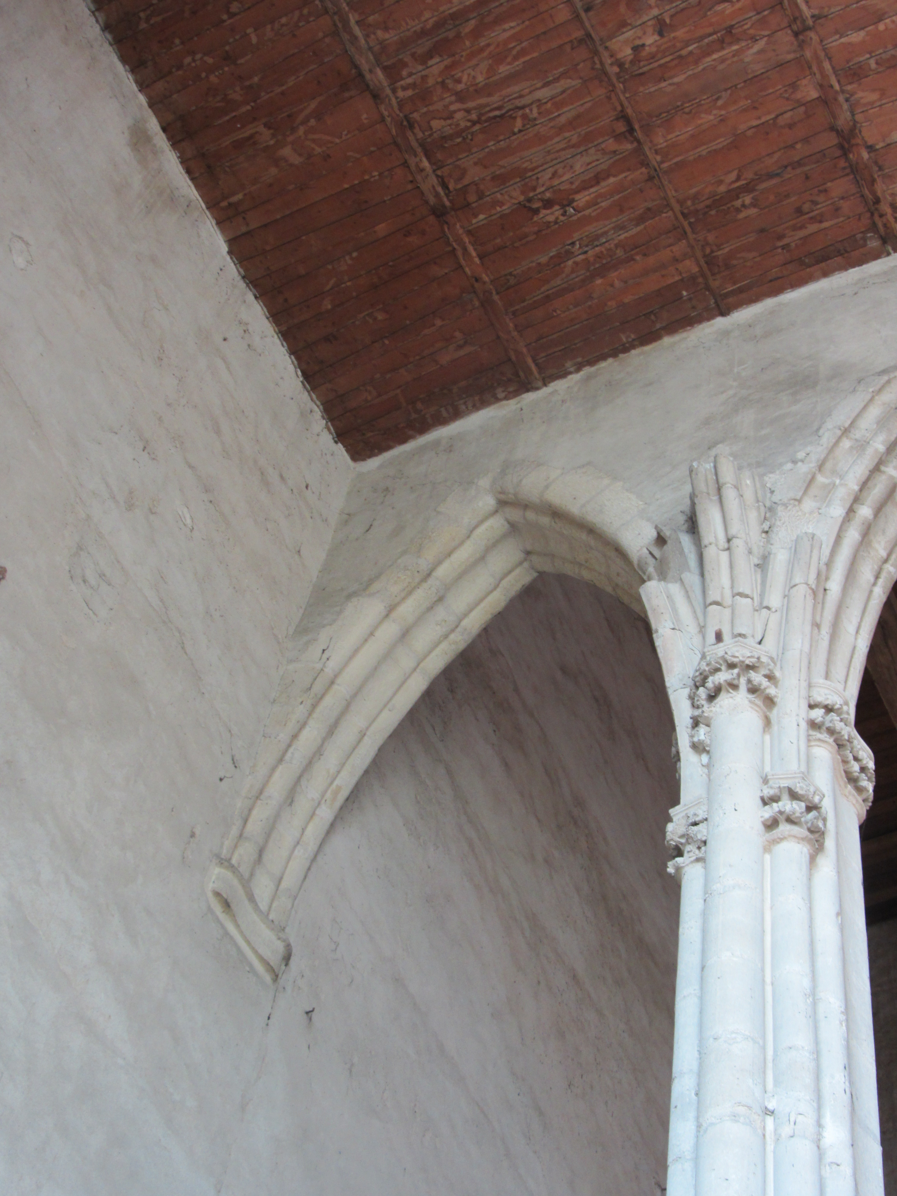 Cette photo montre le départ d'une arcade qui n'aboutit pas. La nef aurait du être plus longue.